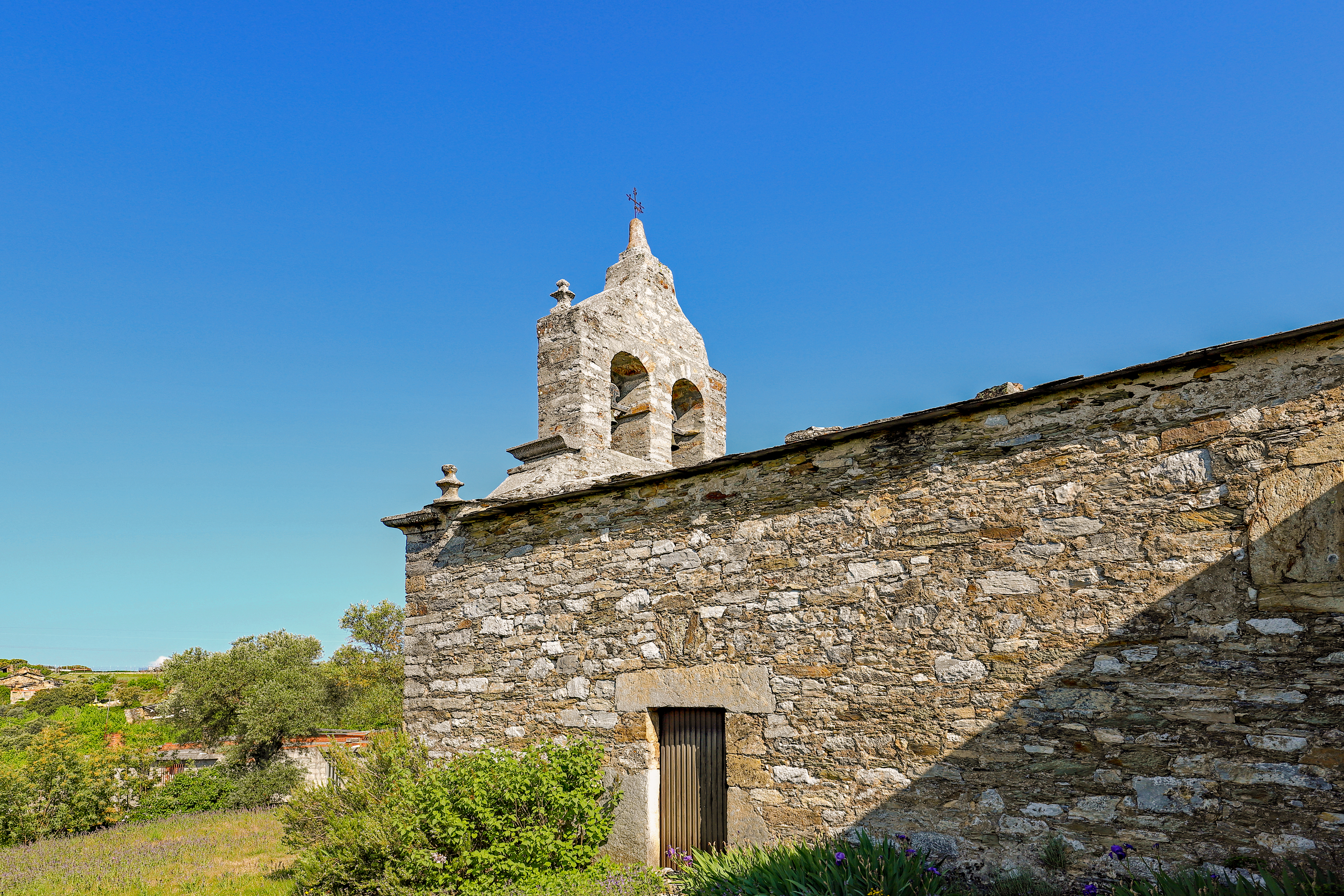 San Juan de Paluezas es una localidad que pertenece al municipio de Borrenes en la comarca de El Bierzo, provincia de León.